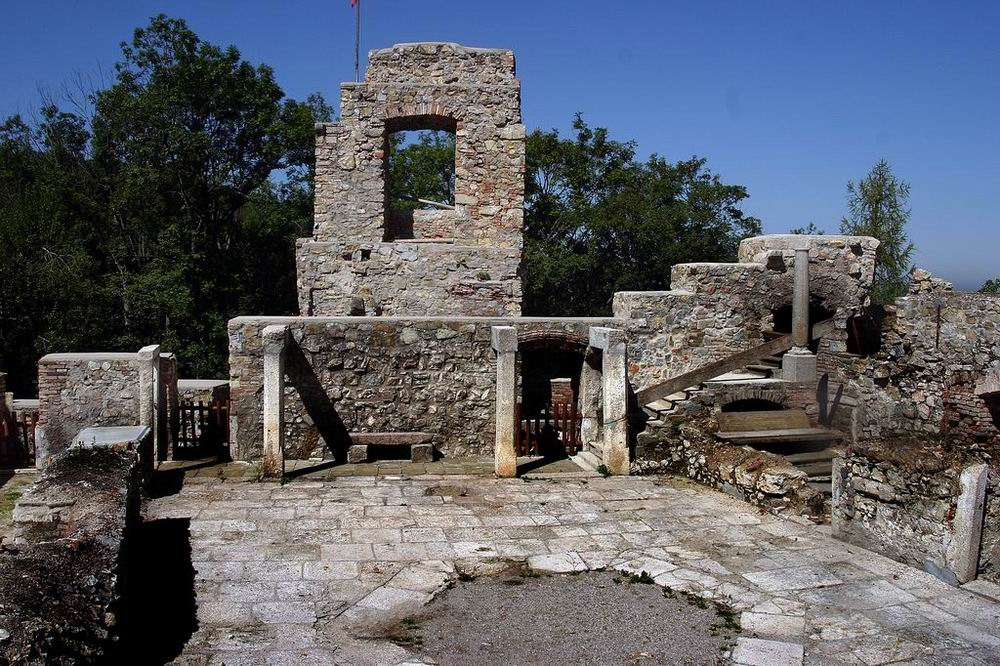 Die Ruine der Seisenburg 2008.